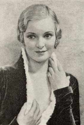 Linda Watkins in Sob Sister